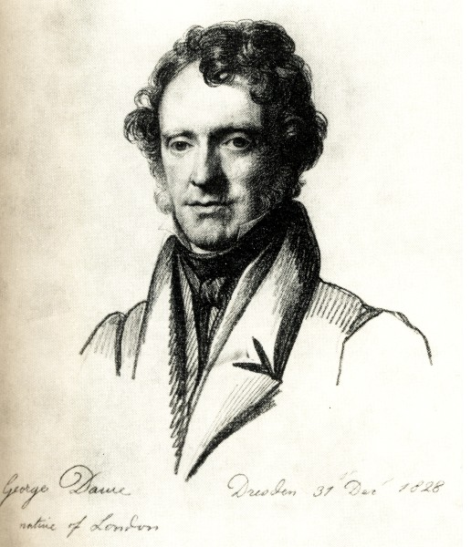 Porträt des Malers George Dawe